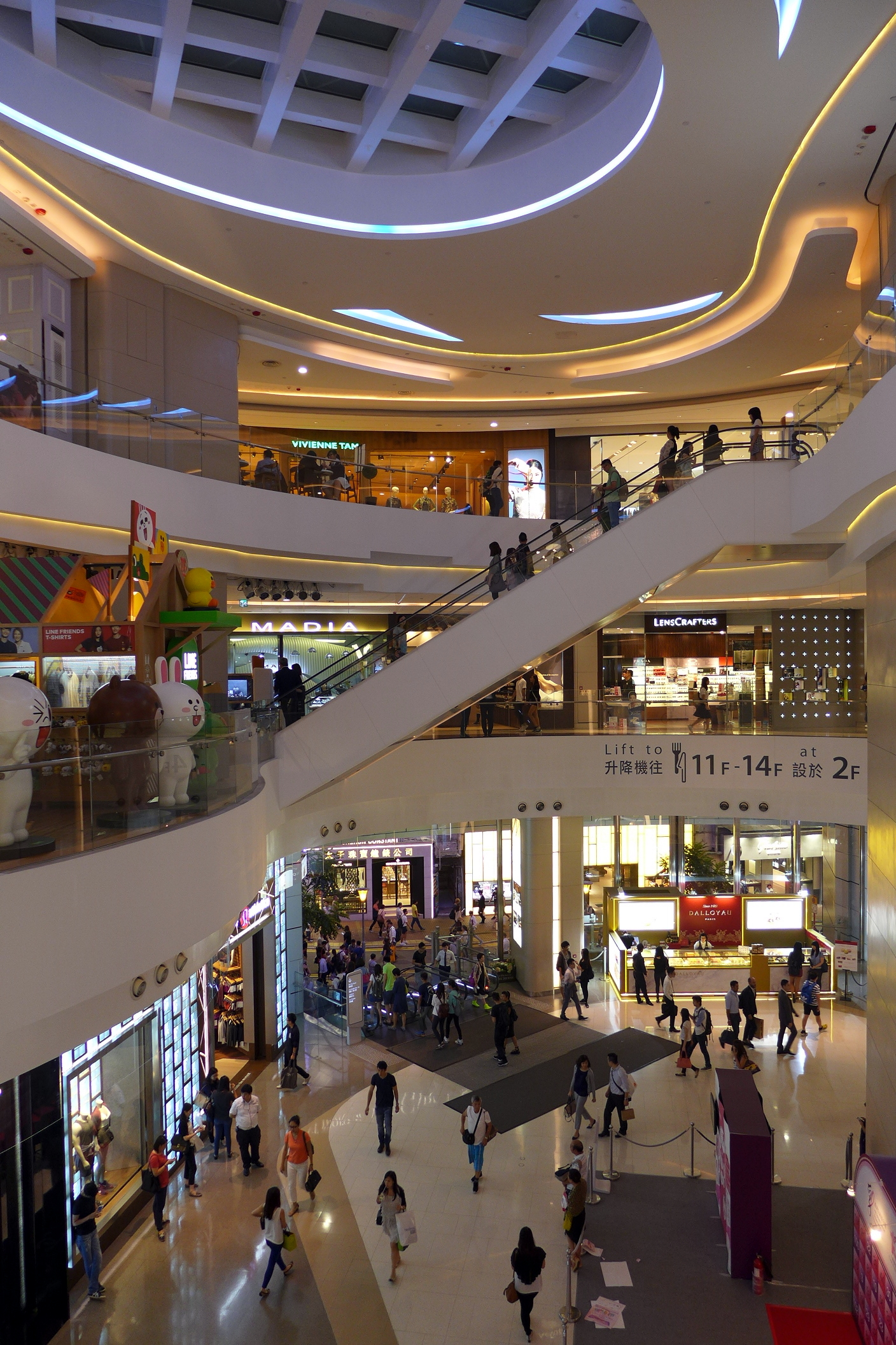 Hysan Place Void View